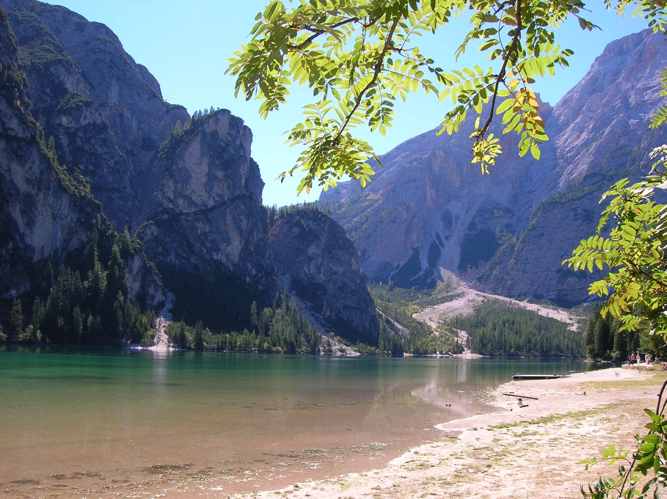 Blick auf das Suedost Ufer mit Pilatus am linken Bildrand